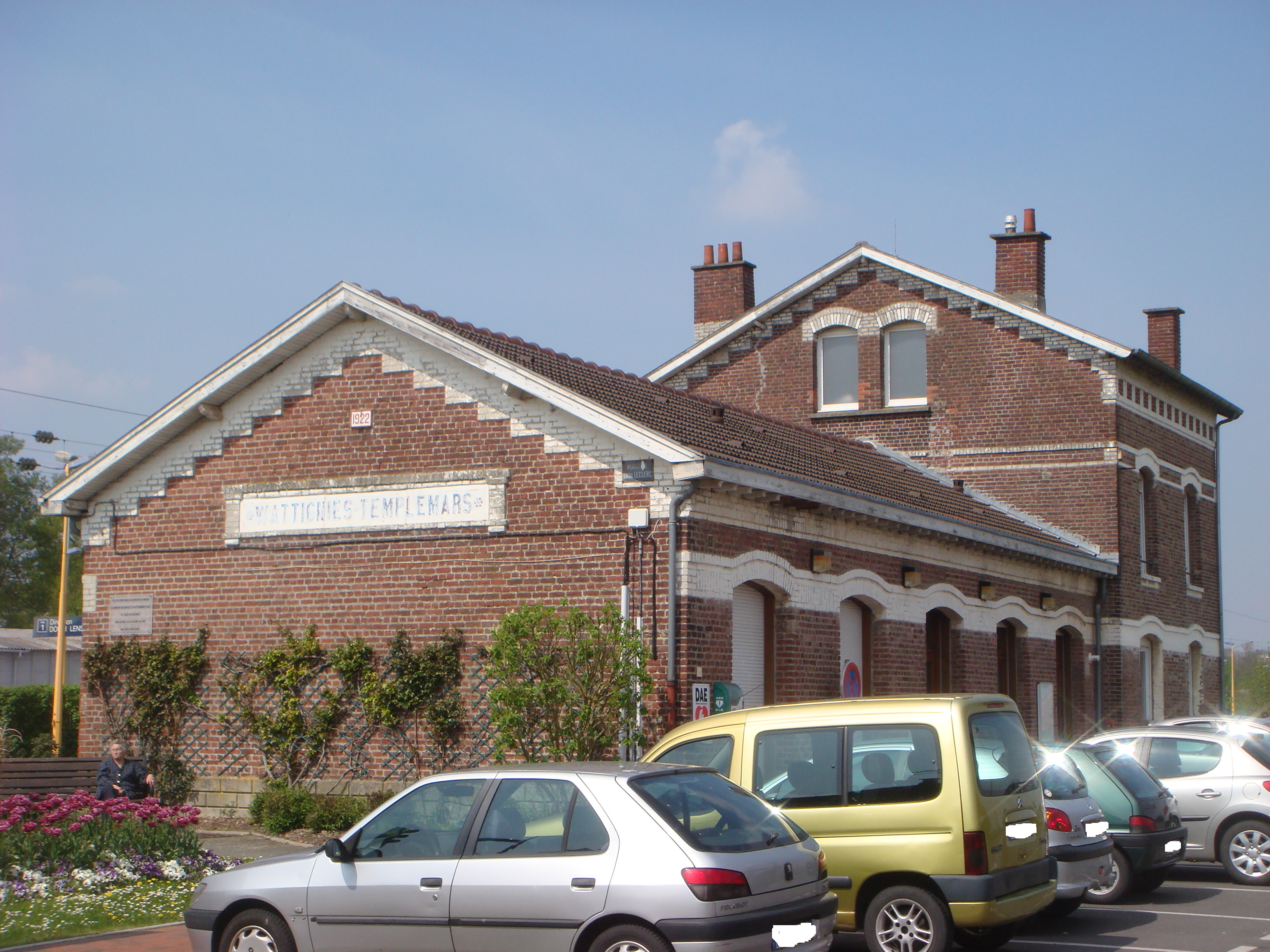 Gare de Wattignies - Templemars - Nord